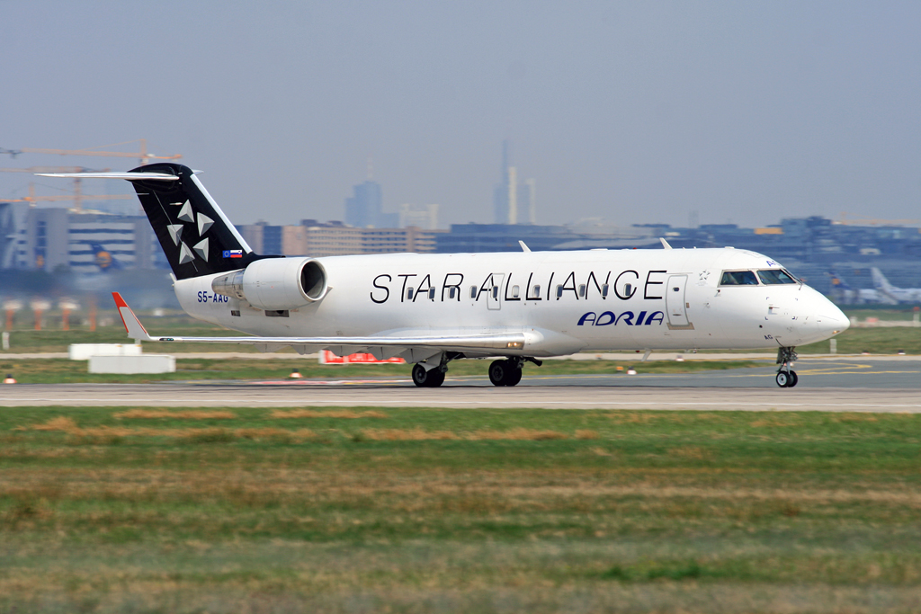 Adria Airways mit Star Alliance Bemalung